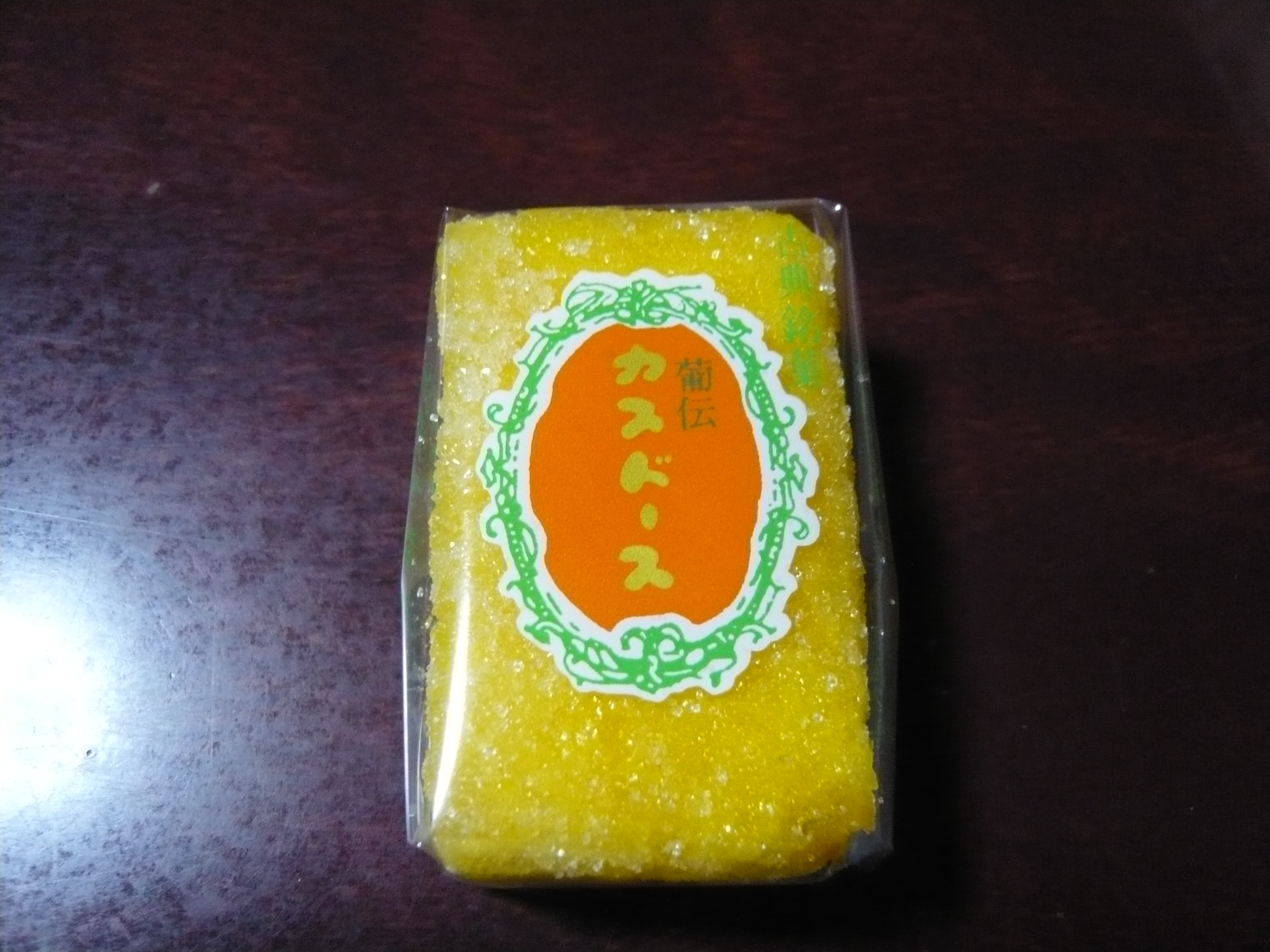 平戸市の銘菓カスドース